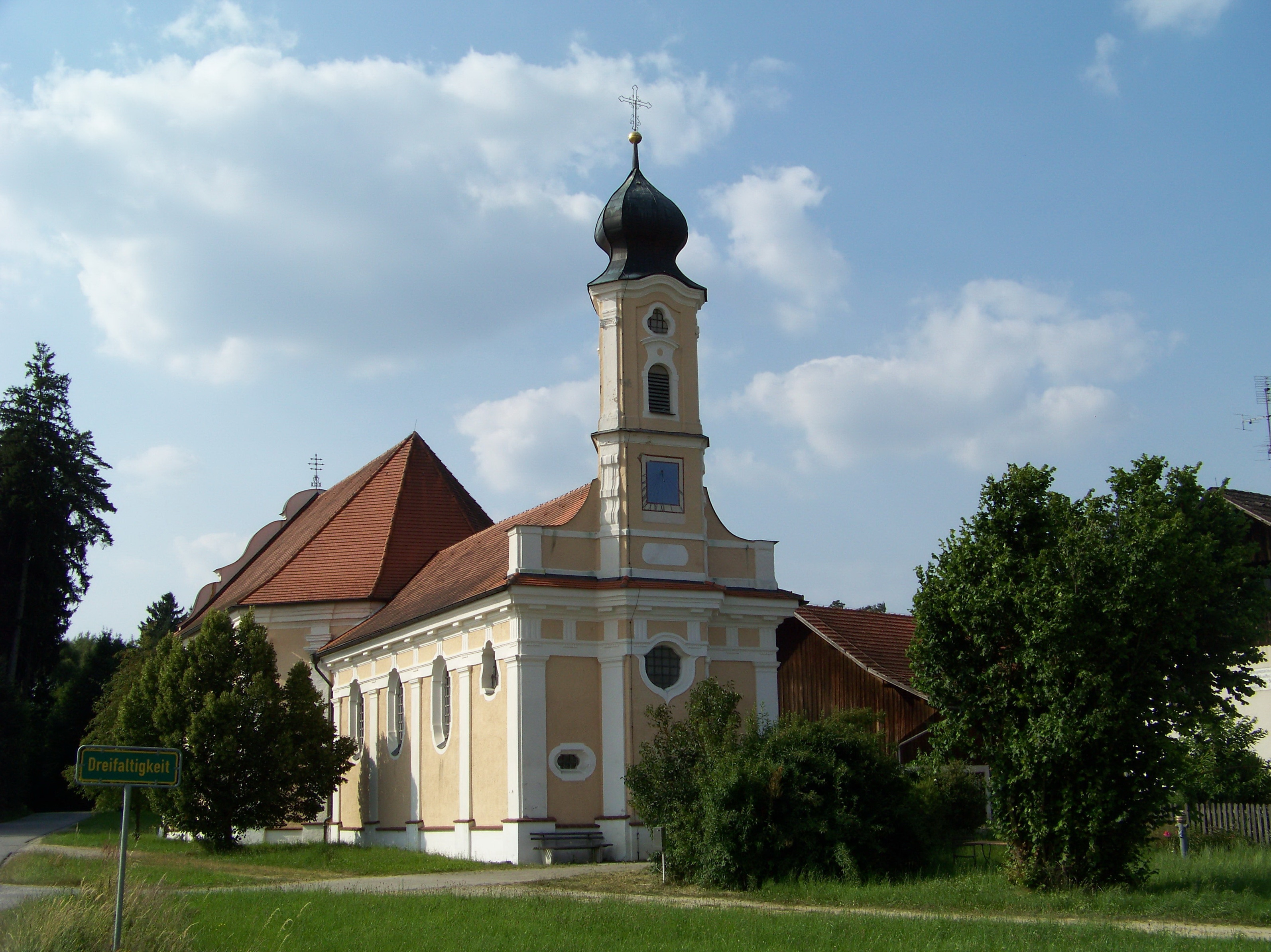 Aham, Dreifaltigkeit 1. Kath. Wallfahrtskirche Hl. Dreifaltigkeit, 1710 und 1775 mit Ausstattung.